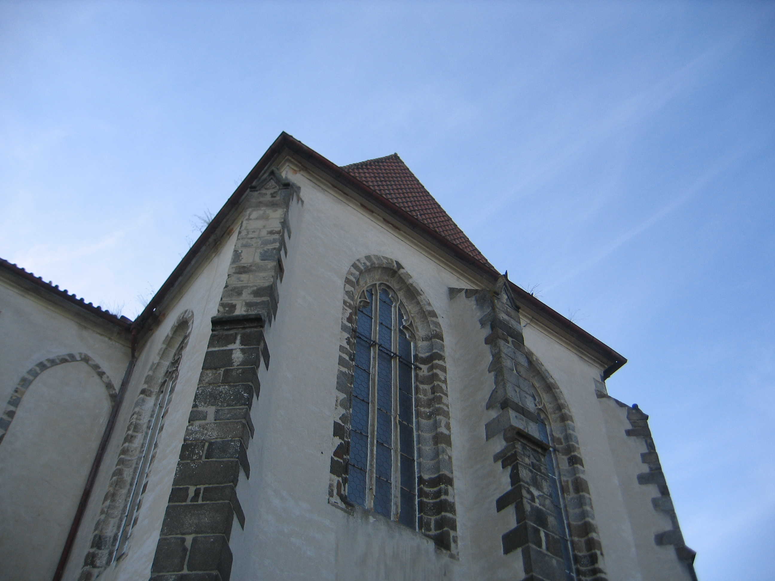 Nezamyslice (okr. Klatovy), kostel Nanebevzetí Panny Marie, presbytář od východu.